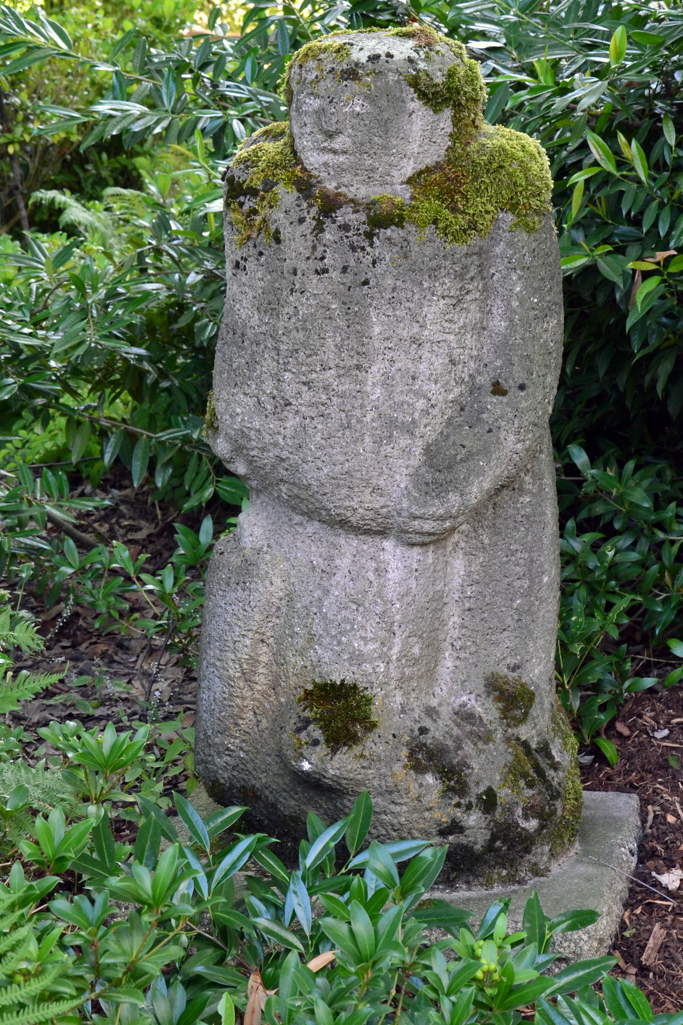 Skulptur "Kohlenträger" (1958) von Bruno Krell, im Grugapark Essen